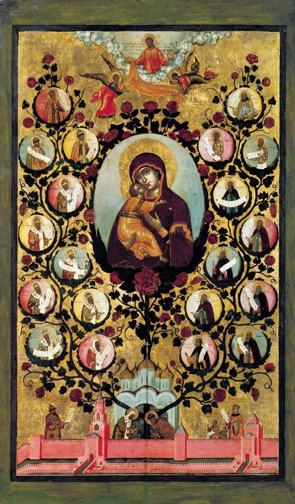 Богоматерь Владимирская — Древо Государства Московского